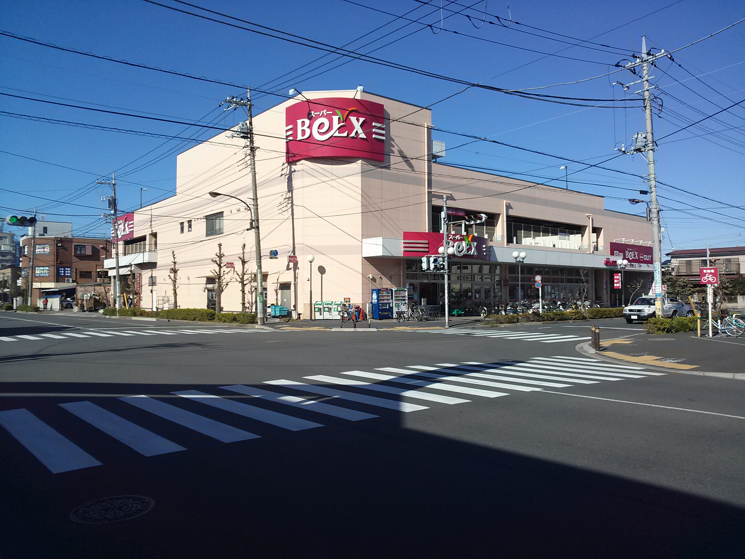 Belx Adachi Minami-Hanahata, ベルクス足立南花畑店